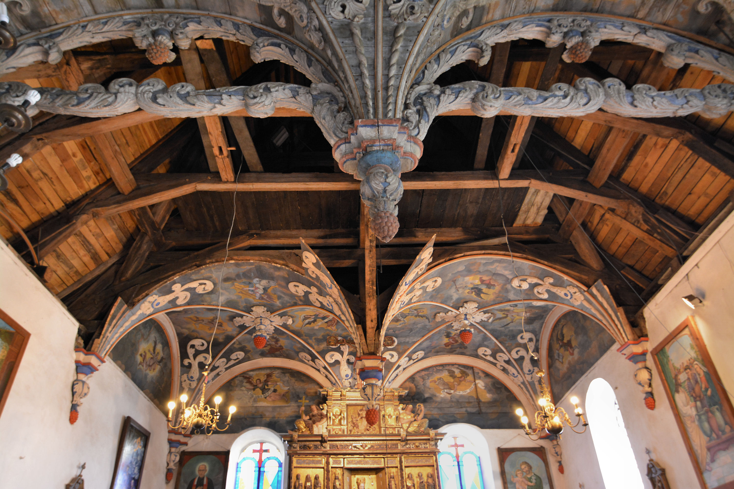 Kościół w Brzesku (koło Pyrzyc)